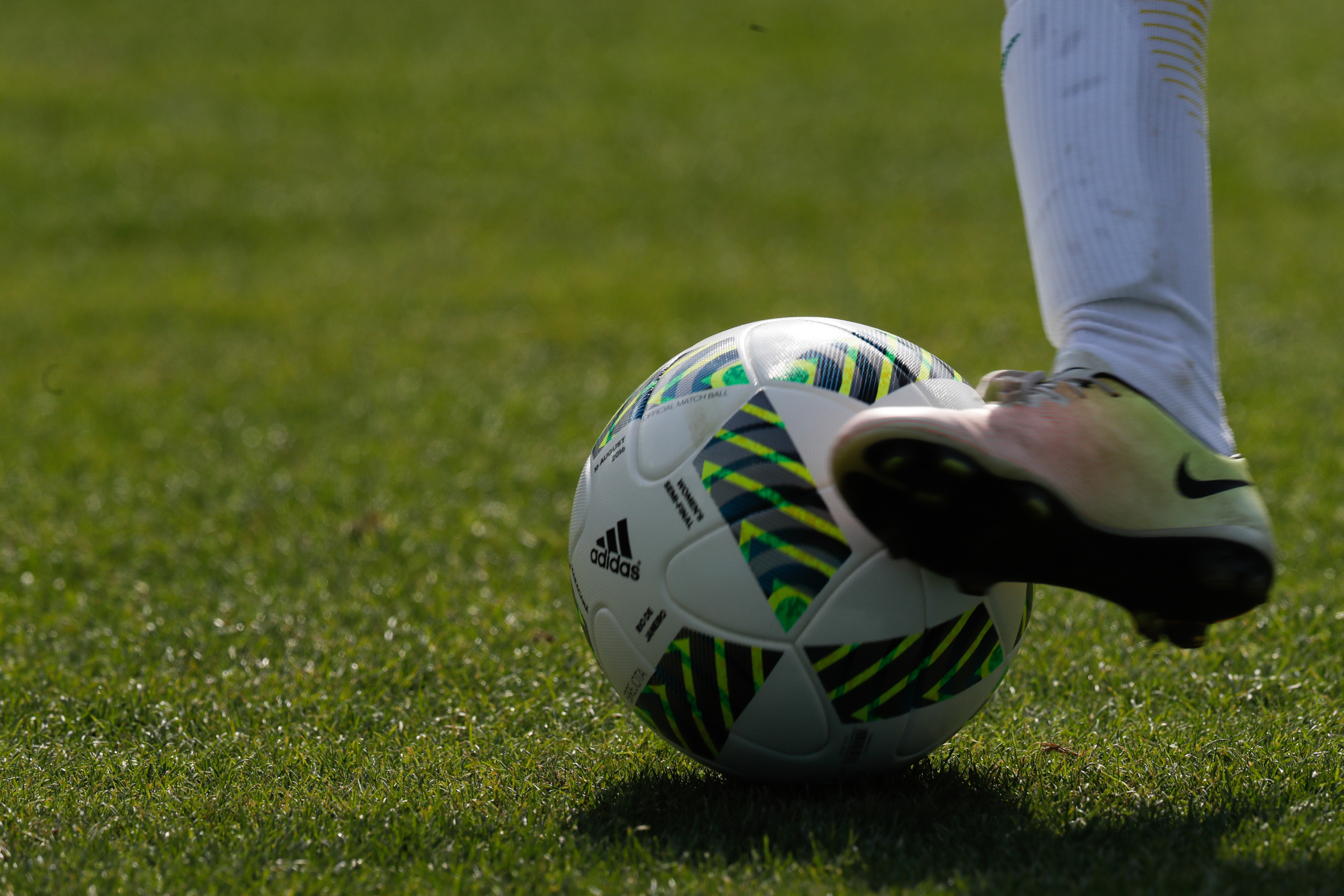 Rio de Janeiro - Seleção brasileira de futebol feminino disputa semifinal com a Suécia, no Maracanã. O Brasil perde nos pênaltis e vai disputar o bronze (Fernando Frazão/Agência Brasil)